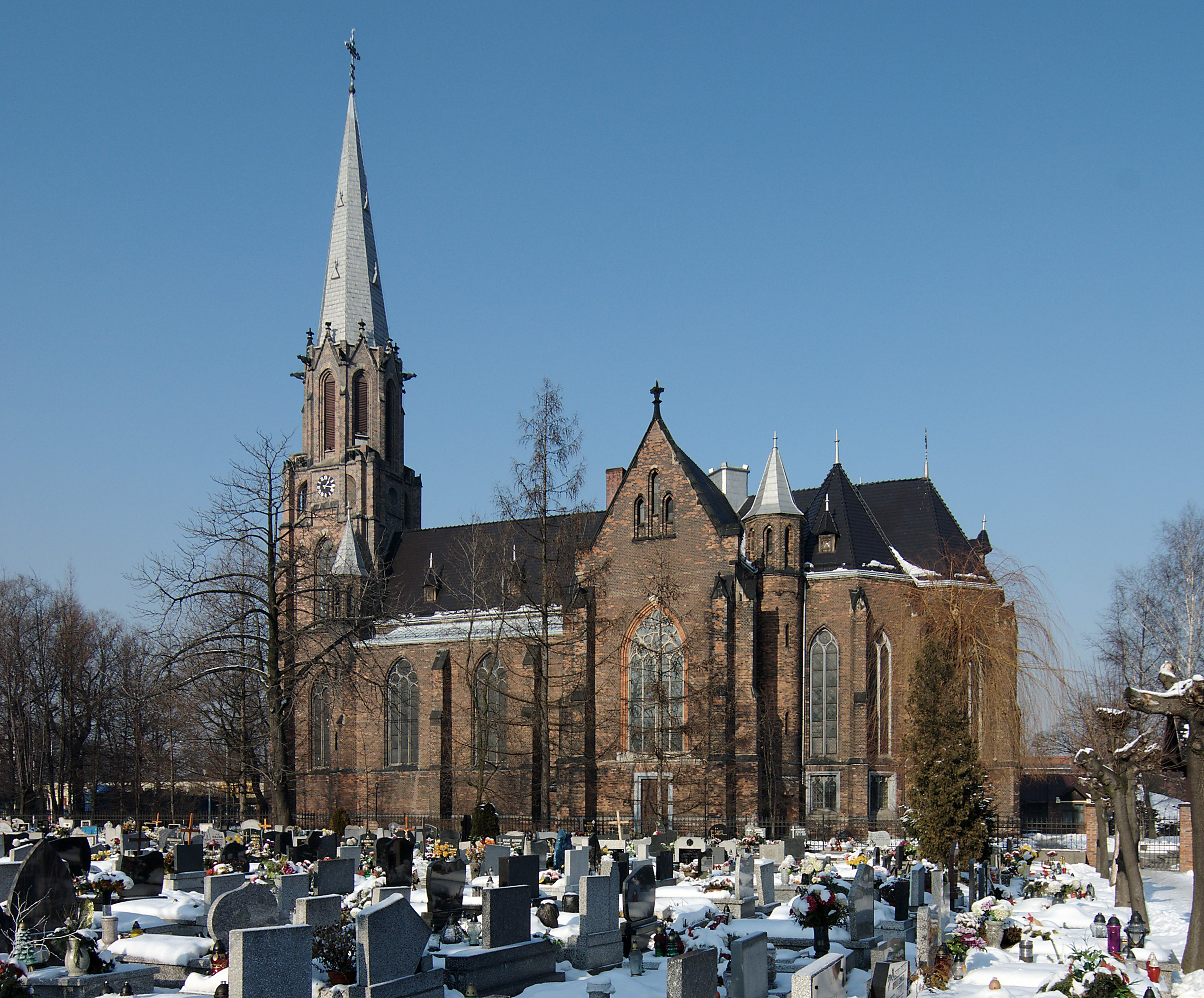 Ruda Śląska Godula, ul. Goduli 22 - kościół parafialny pw. św. Jana Chrzciciela (zabytek nr A/10/99 z 30.04.1999)